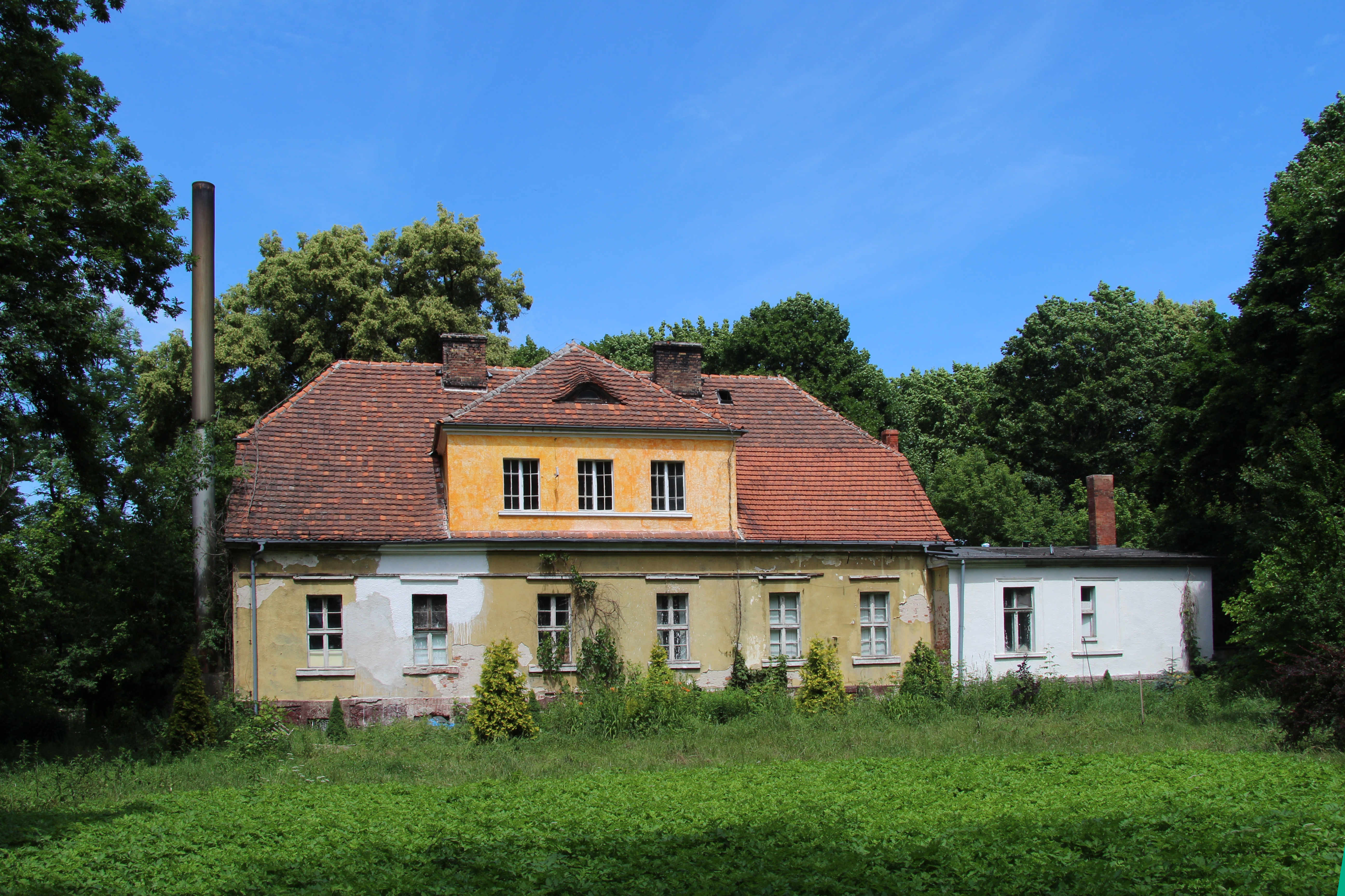 Dwór Działyńskich w Trzebawiu (2 poł. XIX w.)